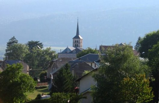 Village d'Hotonnes (vue du Col de Richemont)